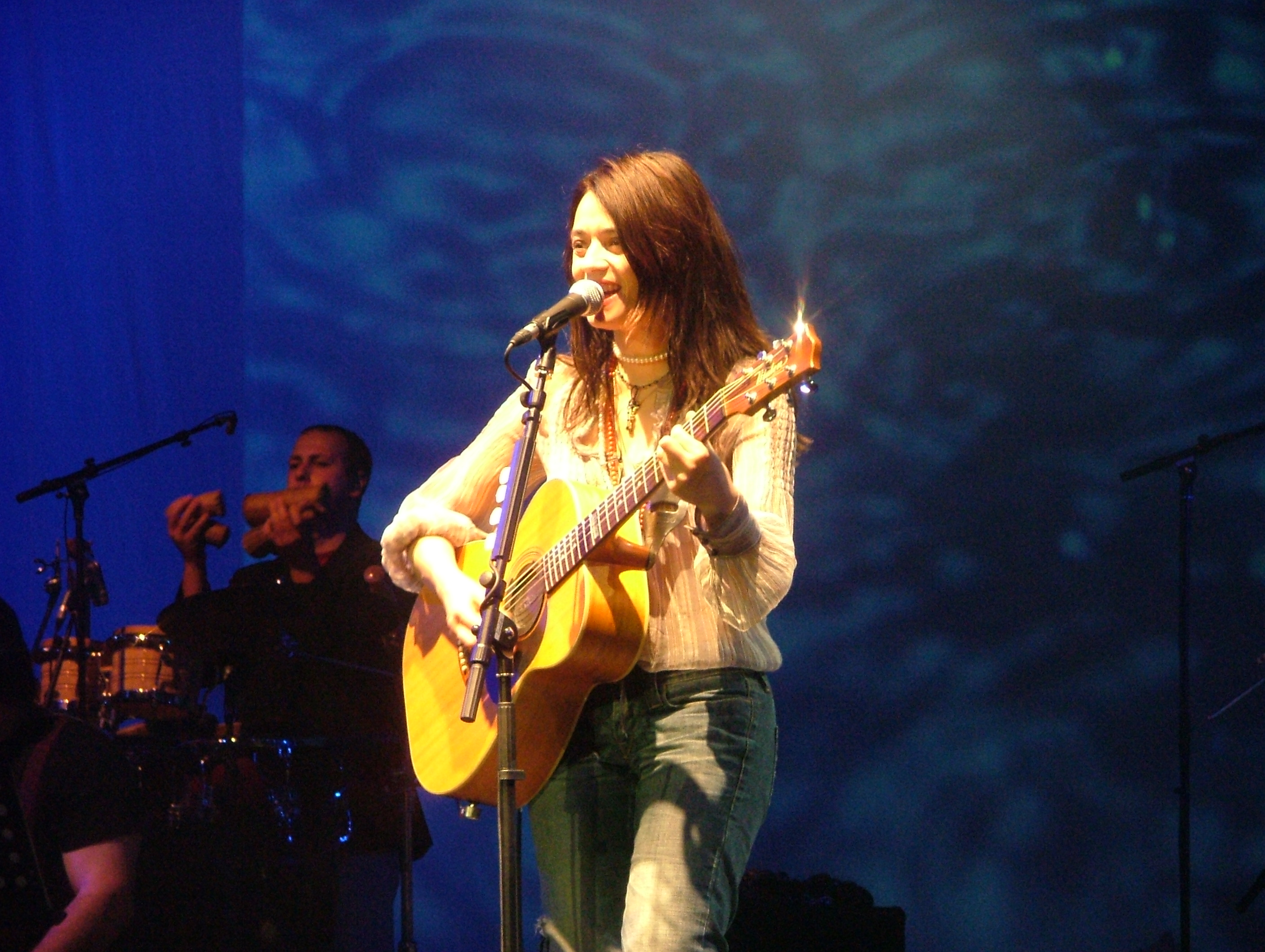 Carmen Consoli - Firenze 17 maggio 2006